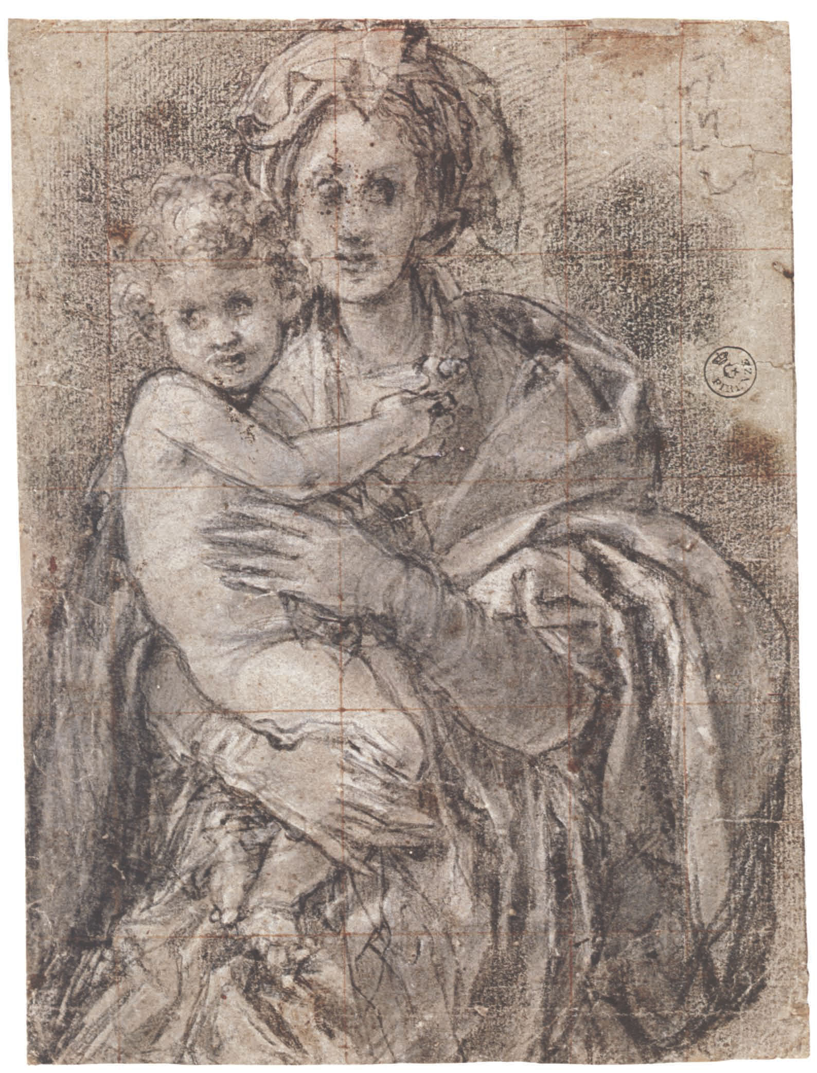 Этюд к картине Понтормо "Мадонна с Младенцем, святыми Иосифом и Иоанном Крестителем"